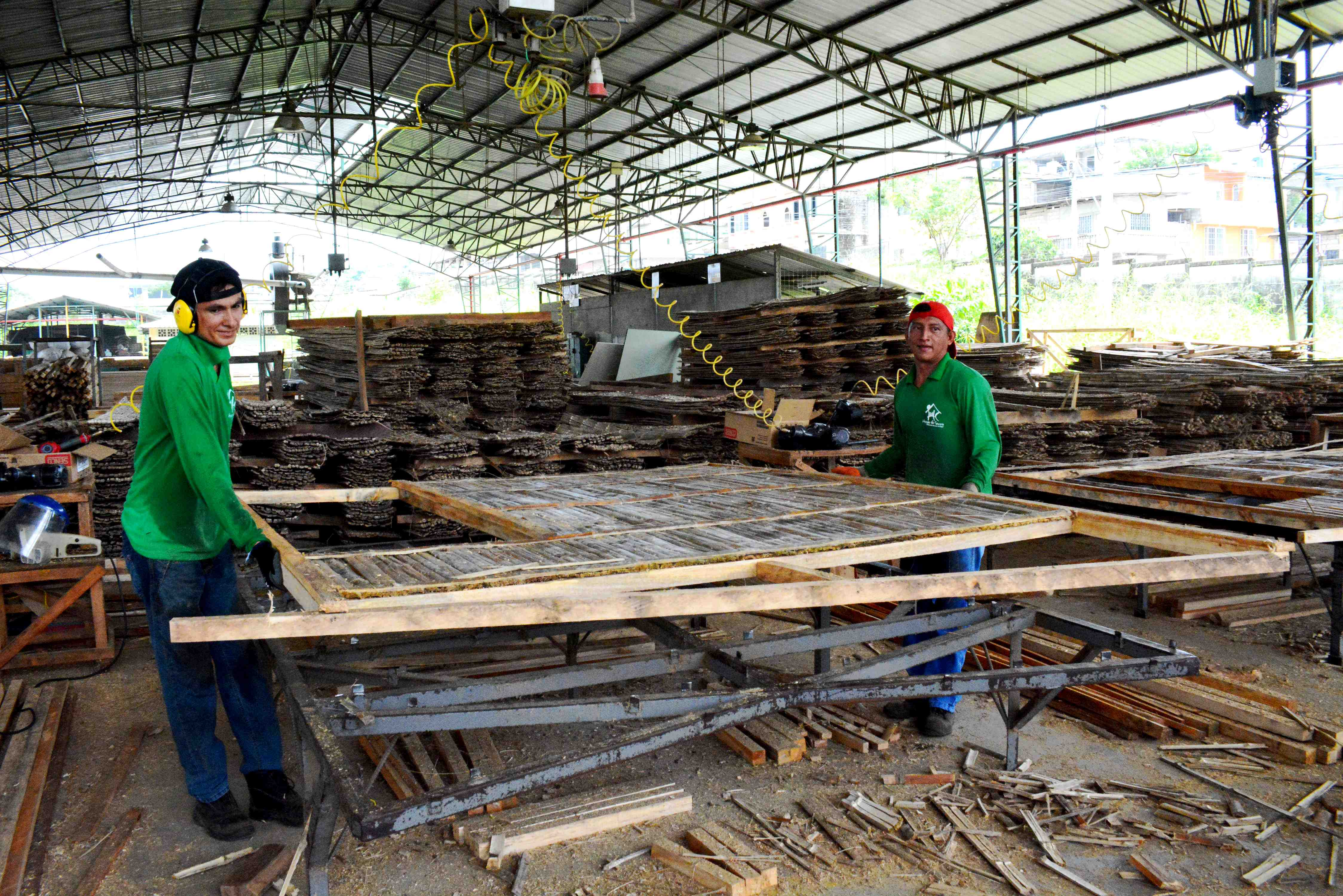 Producción de viviendas emergentes